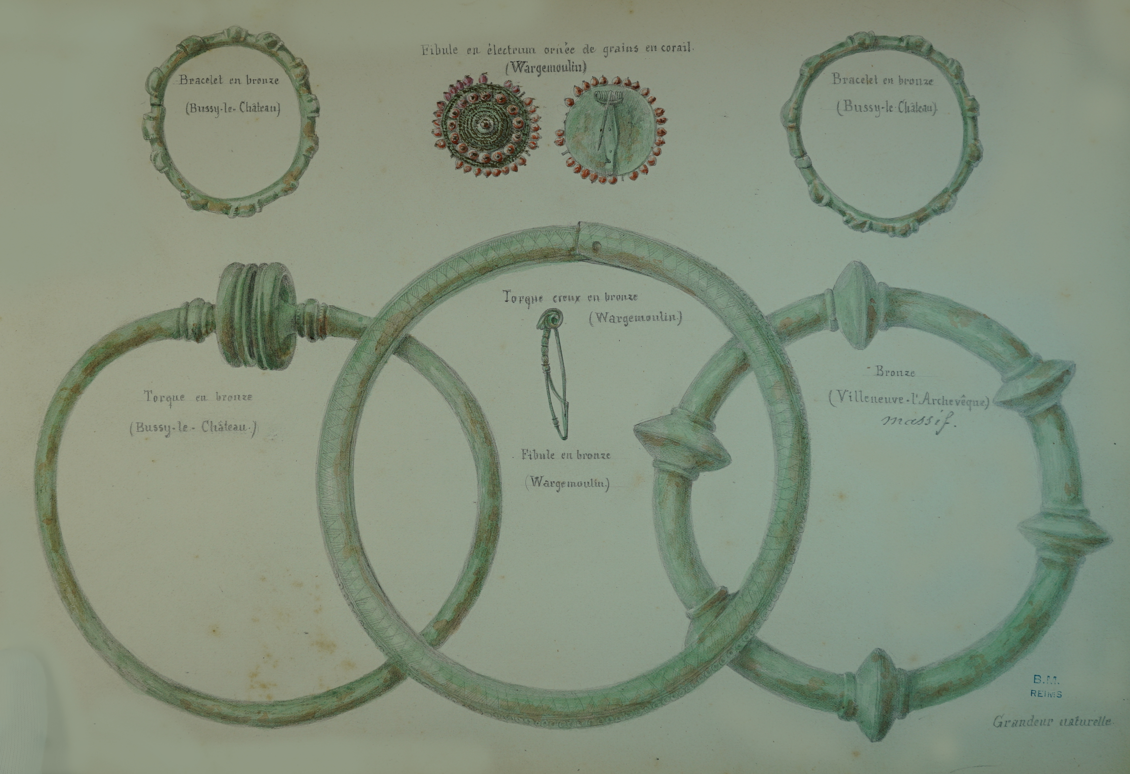 collection Léon Morel